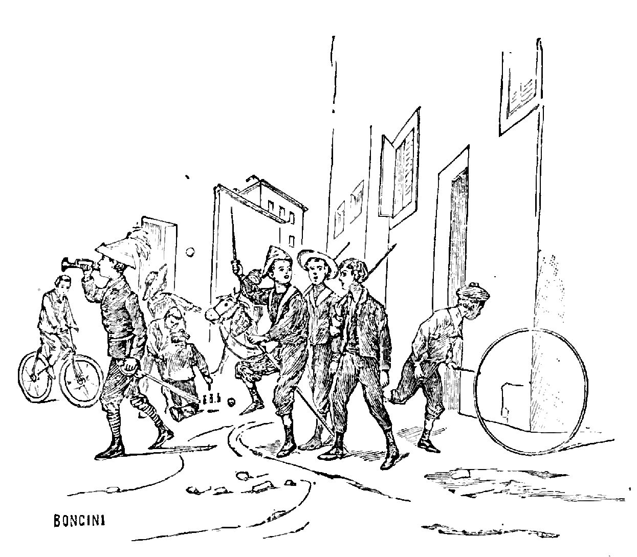 Illustrations from "Le avventure di Pinocchio, storia di un burattino", Carlo Collodi, Bemporad & figlio, Firenze 1902 (Drawings and engravings by Carlo Chiostri, and A. Bongini)